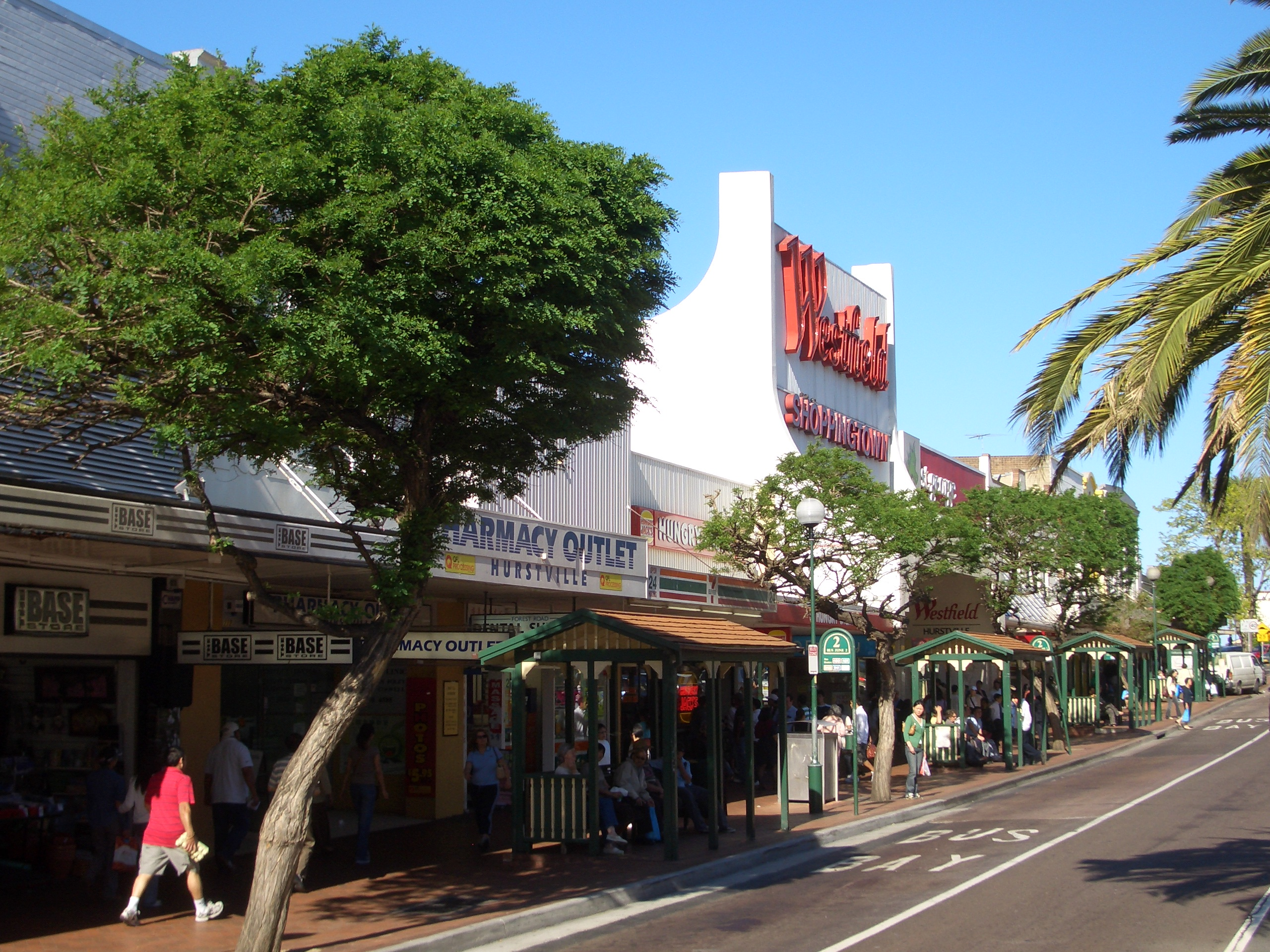 Forest Road, Hurstville, Sydney